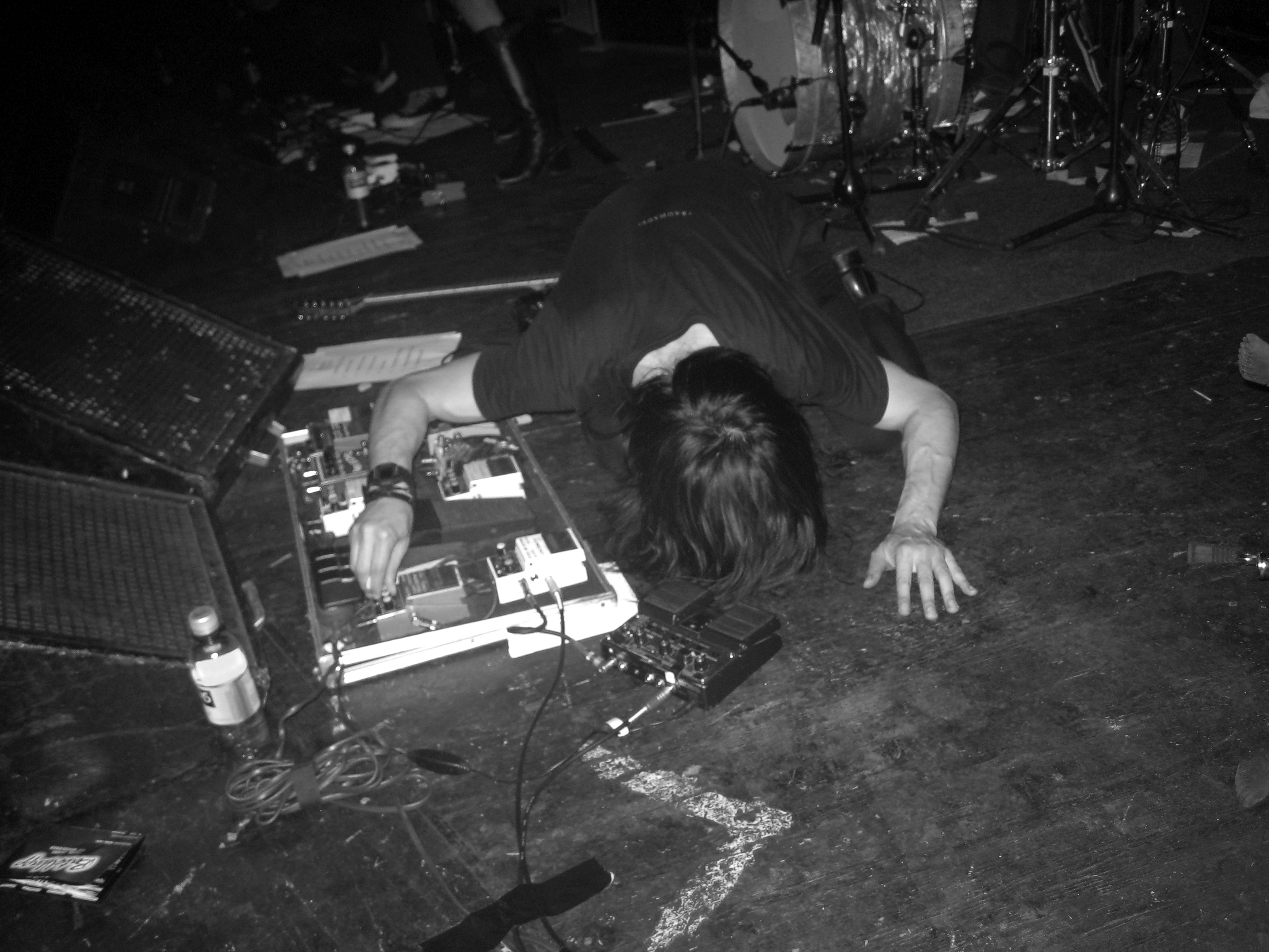 MONO live @ Nachtleben, Frankfurt/Main